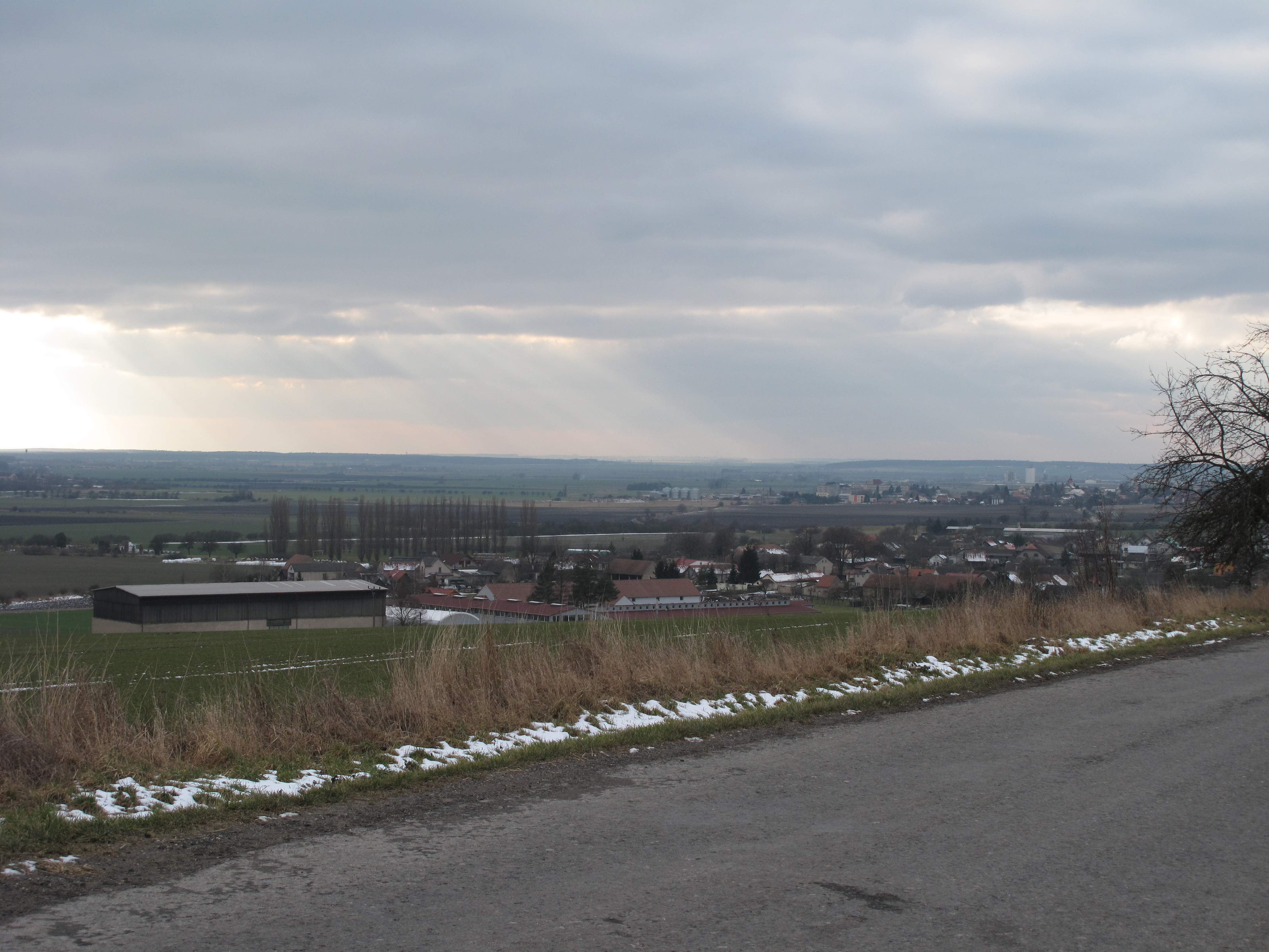 Žerčice ze severu. Okres Mladá Boleslav, Česká republika.